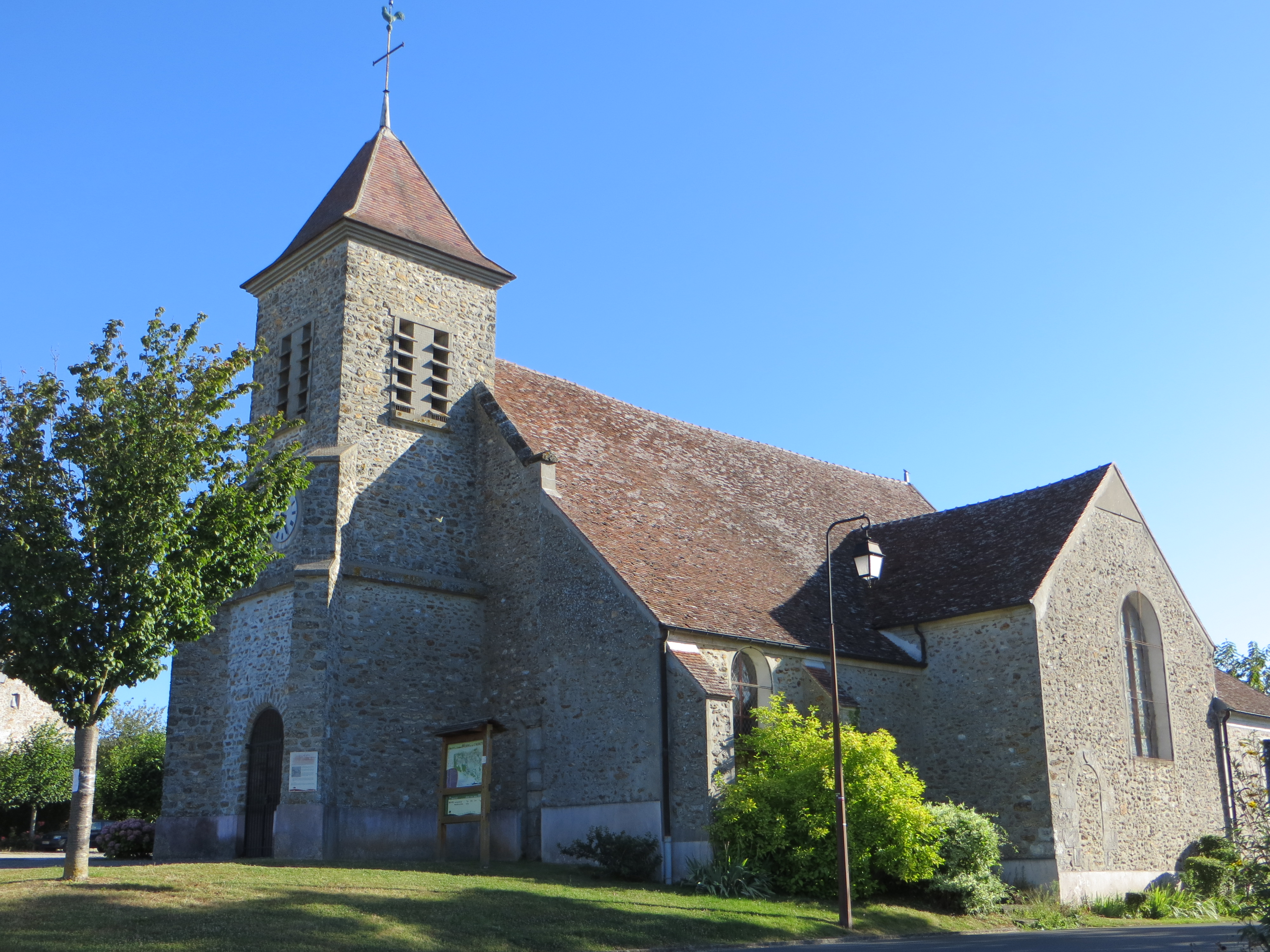 Vue générale de l'église